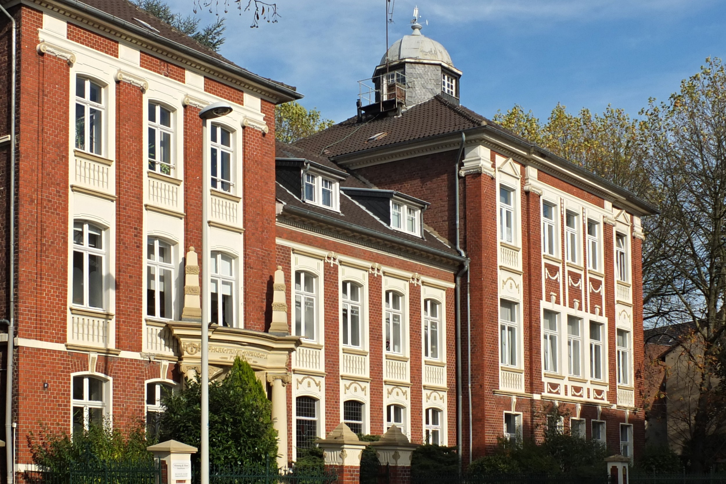 Höhere Privat-Knabenschule und Pensionat, Hilden, Kolpingstraße 9-11This is a photograph of an architectural monument.